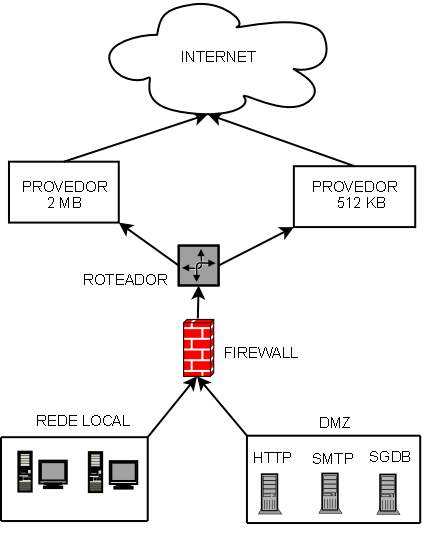 Demilitarized zone (Zona desmilitarizada) em redes de computadores